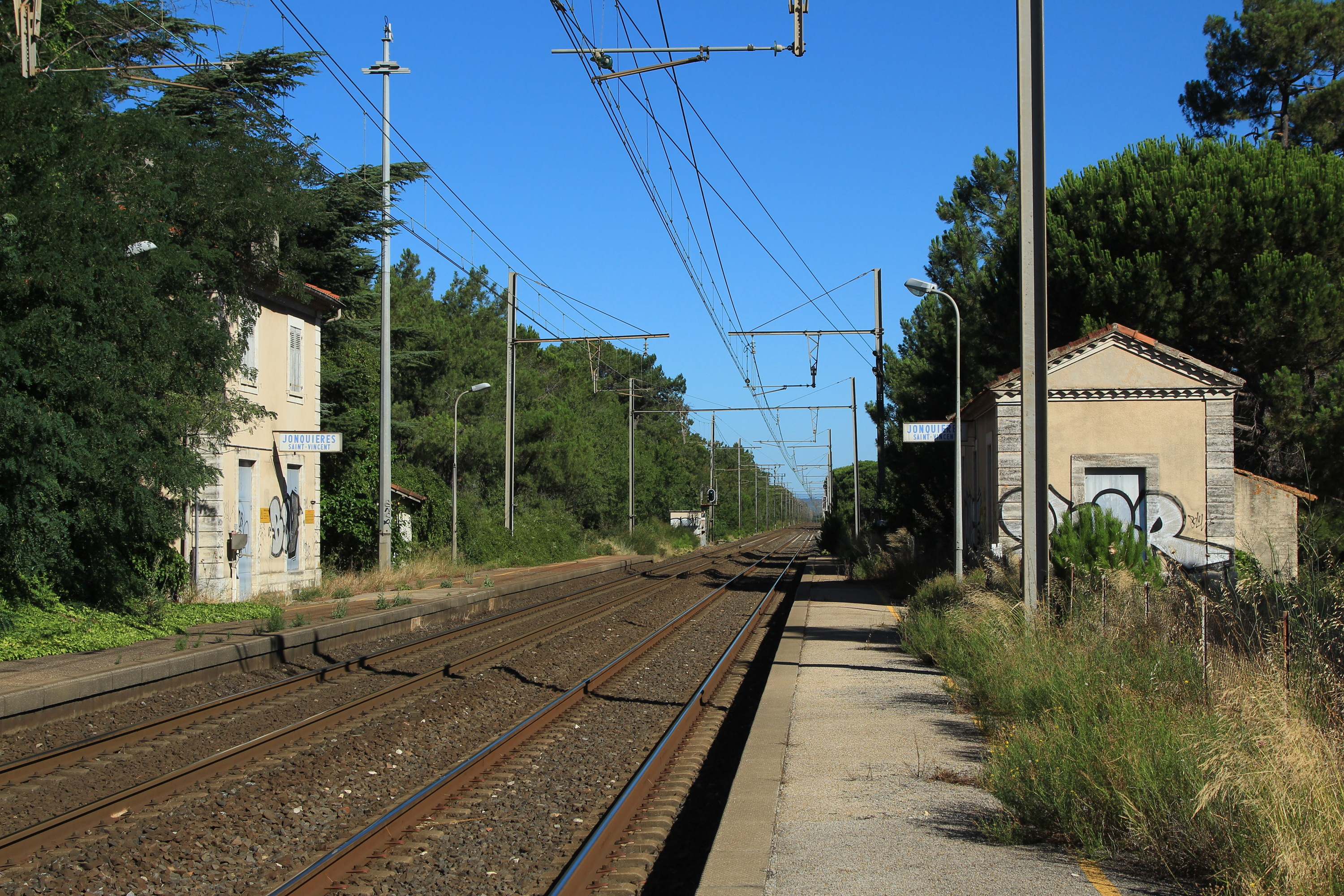 Vue des voies de la gare de Jonquières-Saint-Vincent en direction de Nîmes.